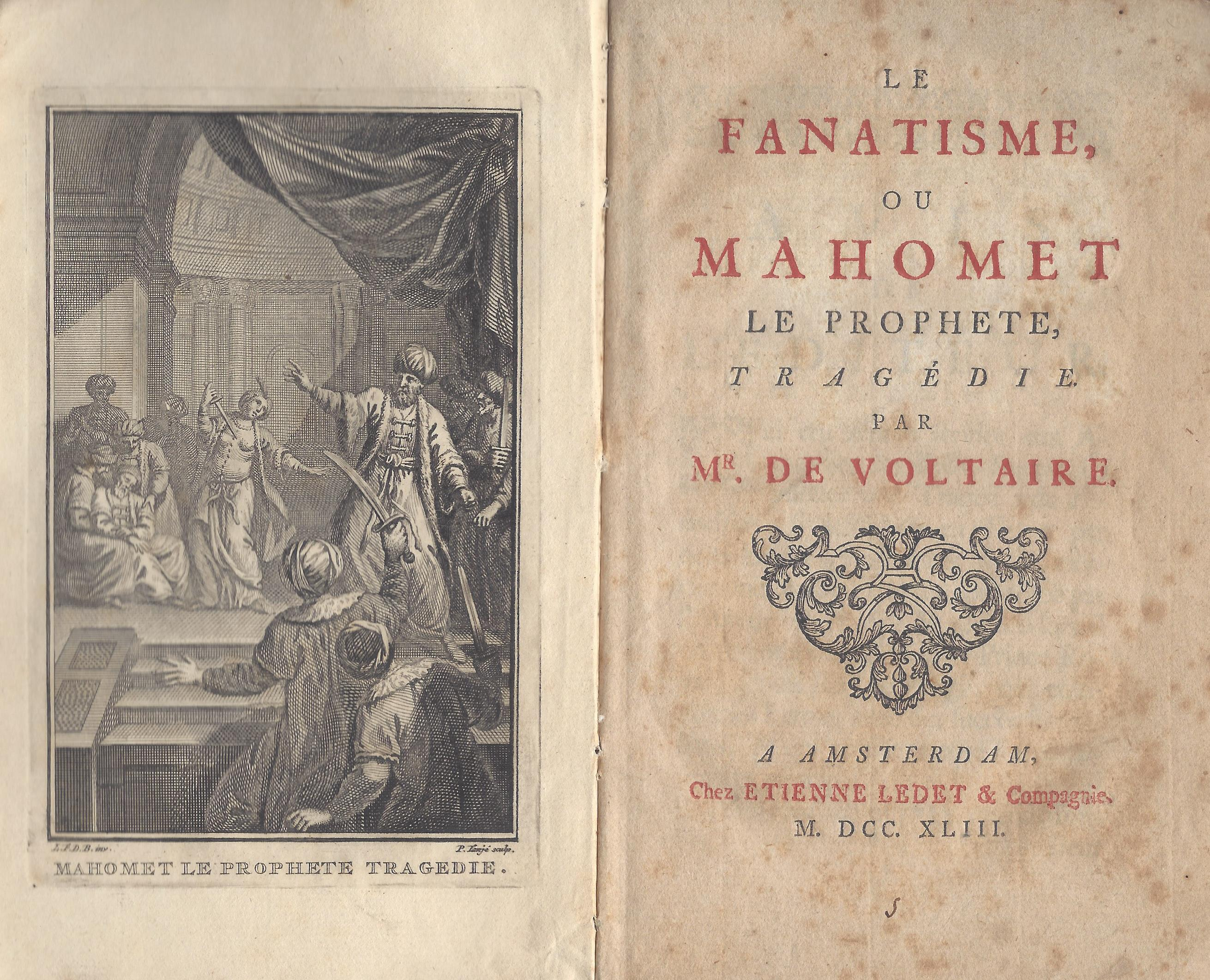 Titelseite der ersten autorisierten Ausgabe des Mahomet von Voltaire, Amsterdam, Ledet,1743, Scan von einem eigenen Exemplar